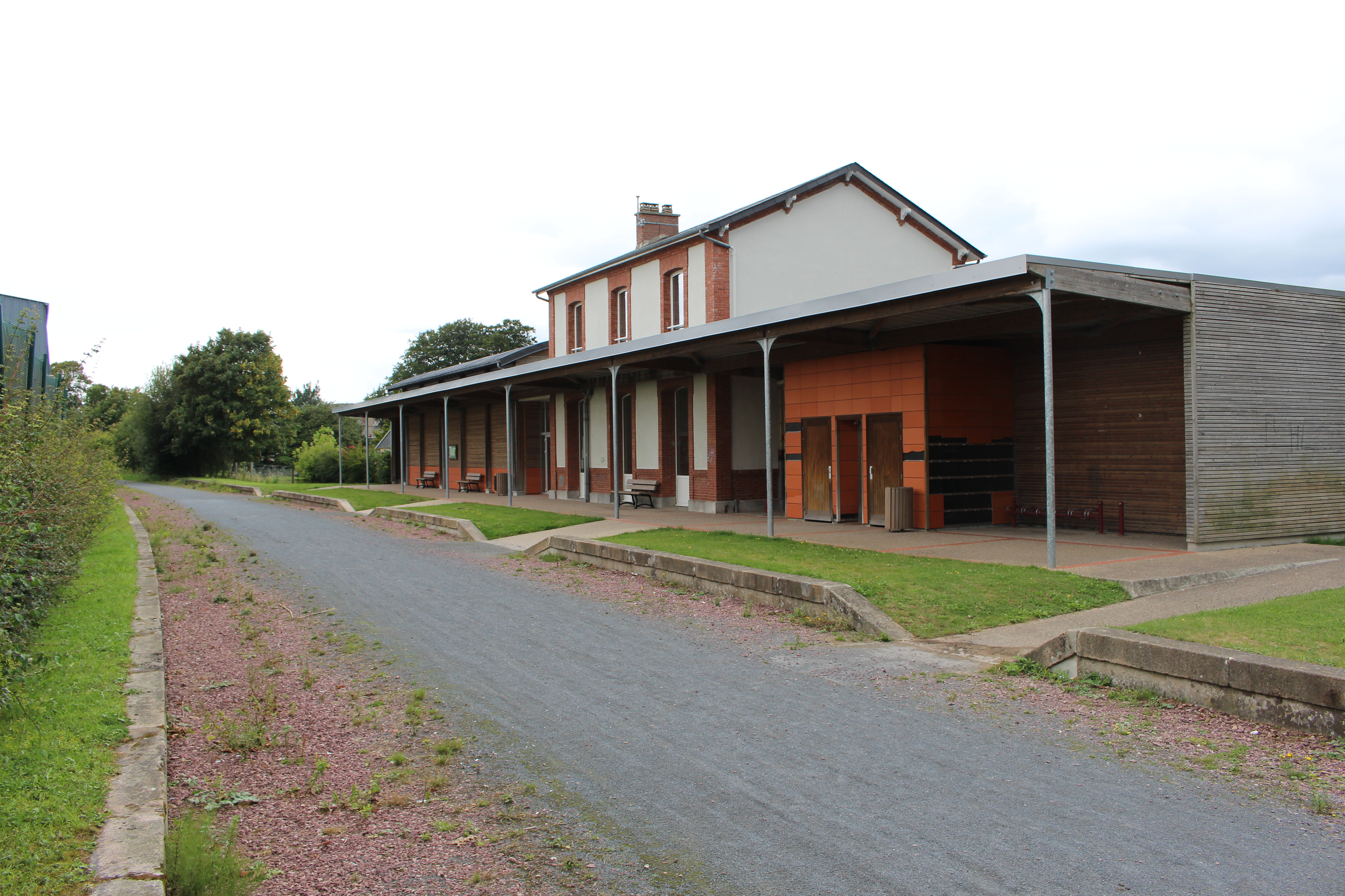 a présent halte randoonneur sur la voie verte